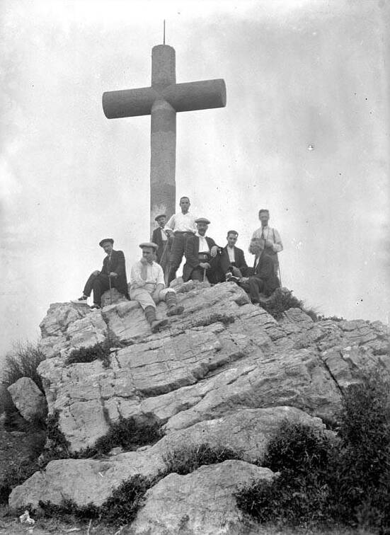 Vista del cim del Puig d'Olorda. Enric Ribas i Virgili (Entre 1920 i 1930)